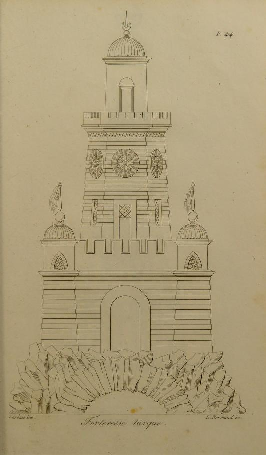 安東南‧卡漢姆的「裝置」蛋糕設計圖樣